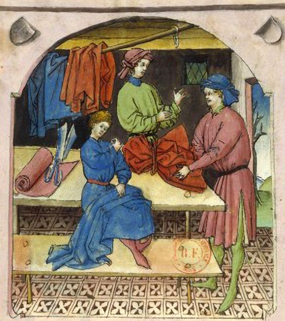 Шёлковый цех. Миниатюра из Tacuinum sanitalis (Latin 9333, fol. 103). XV век. Национальная библиотека Франции, департамент манускриптов.